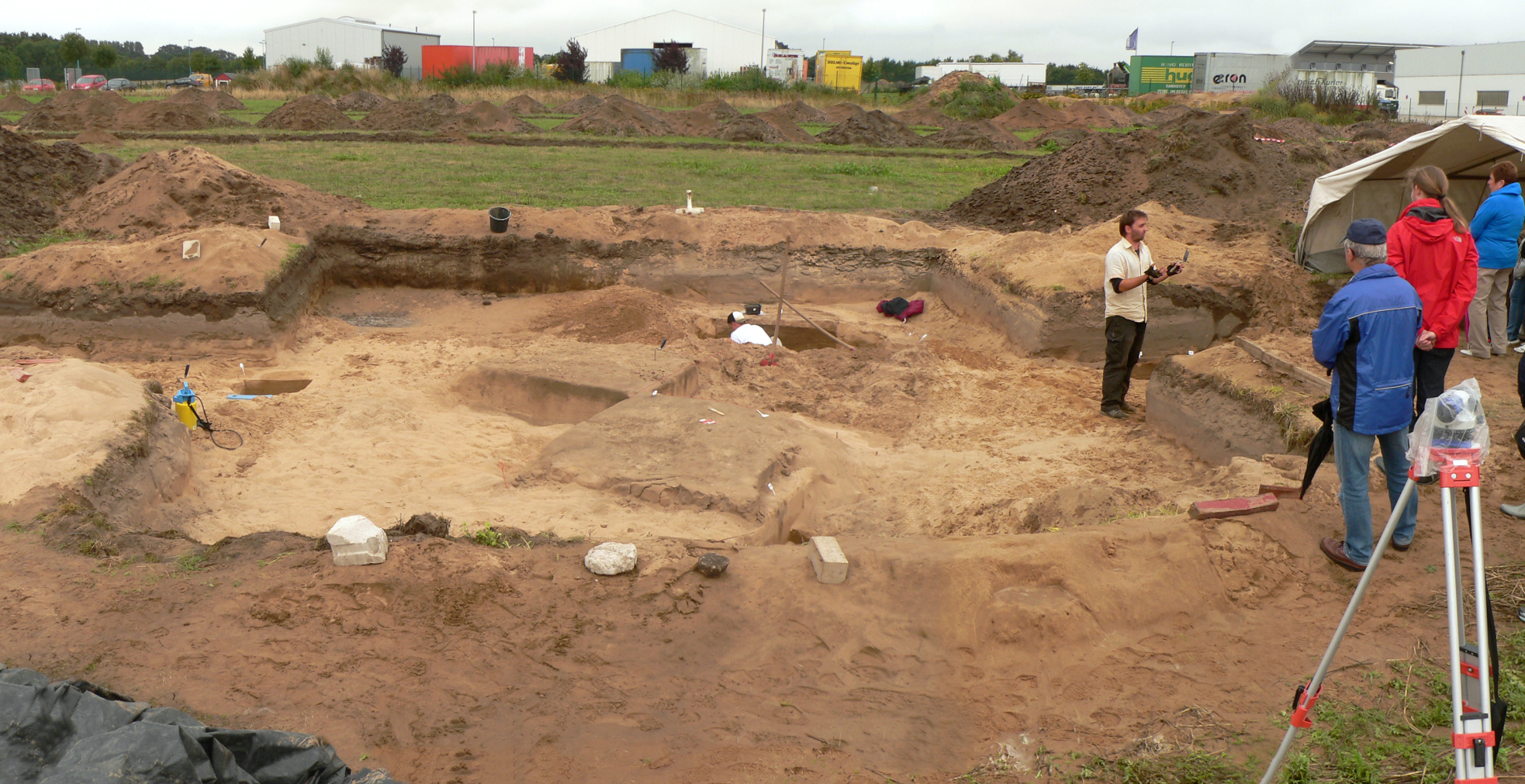 Ausgrabung im Gewerbegebiet Lemke bei öffentlicher Führung durch Tobias Scholz